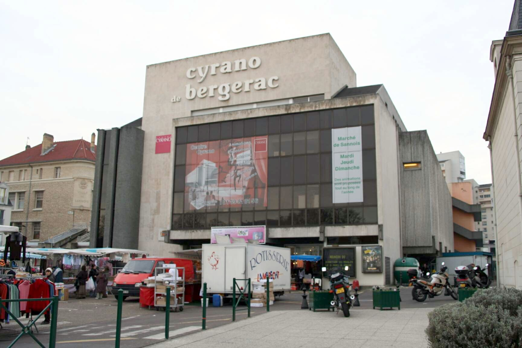 Centre Cyrano de Bergerac à Sannois - Val-d'Oise (France)